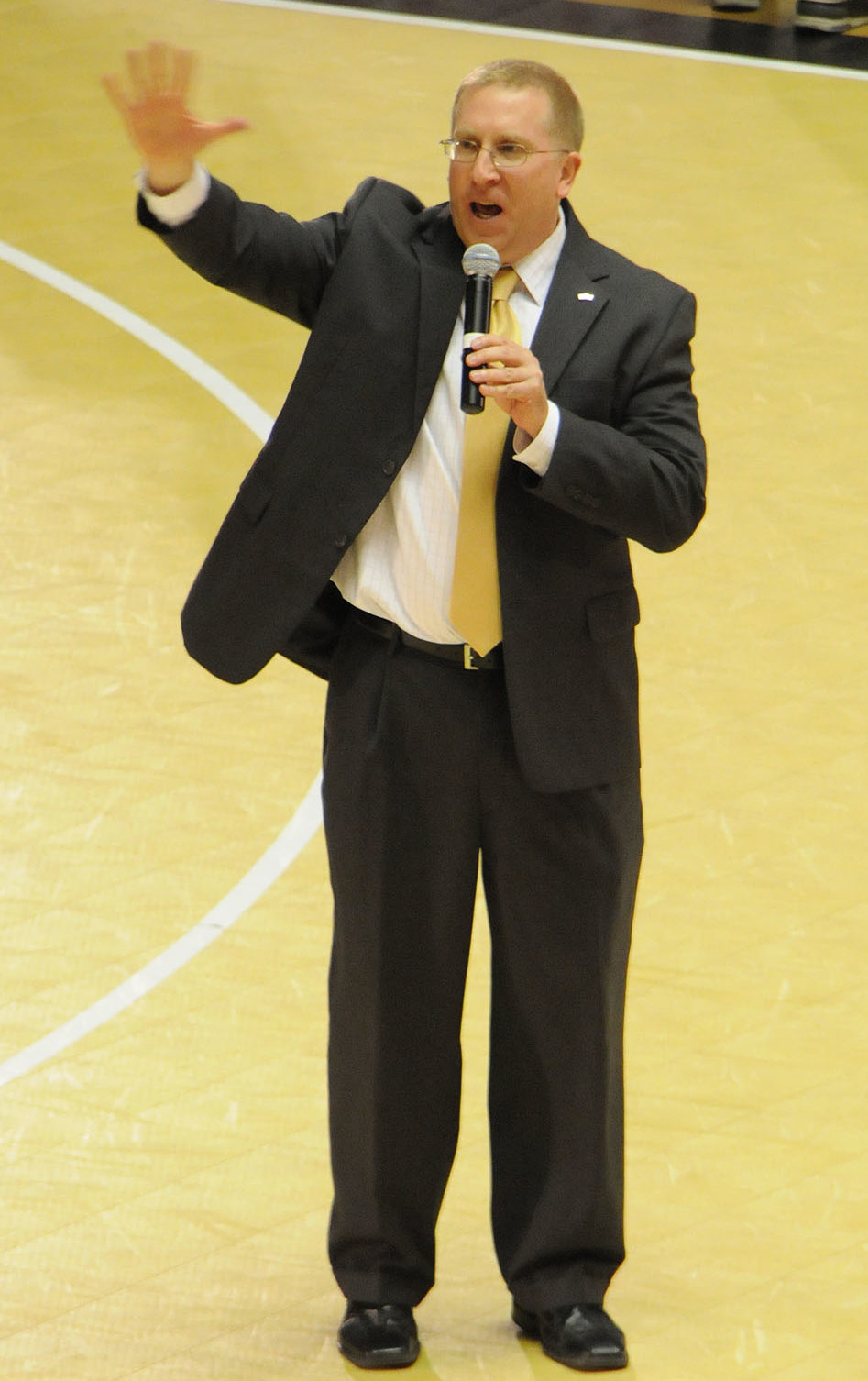 秋田ノーザンハピネッツ、ロバート・ピアスヘッドコーチ。秋田県立体育館で。